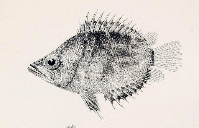 Afrikanische Vielstachler (Polycentropsis abbreviata)